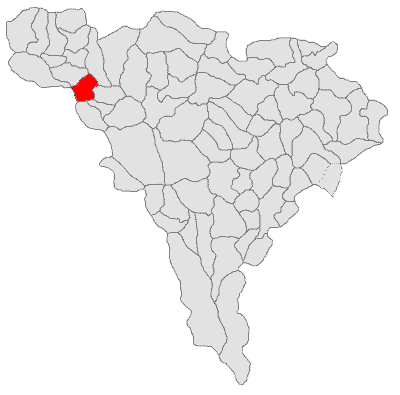 Categorie:Hărţi ale judeţului Alba